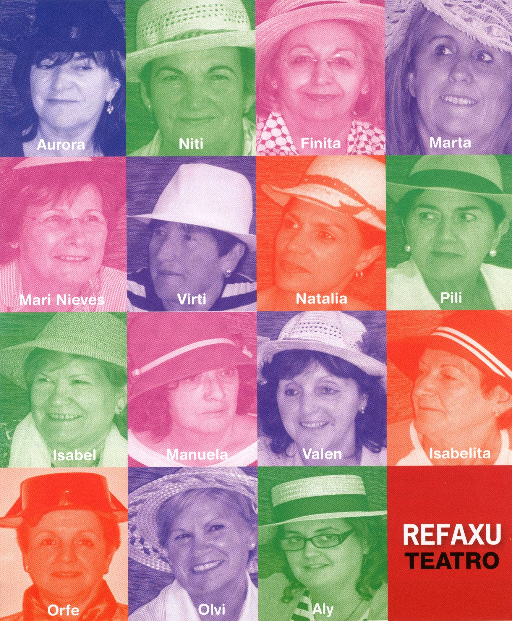 Grupu de Teatru Refaxu